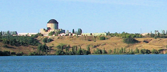 Das verworfene Kernkraftwerk Woronesch in Russland, es sollte zwei AST-Reaktoren besitzen